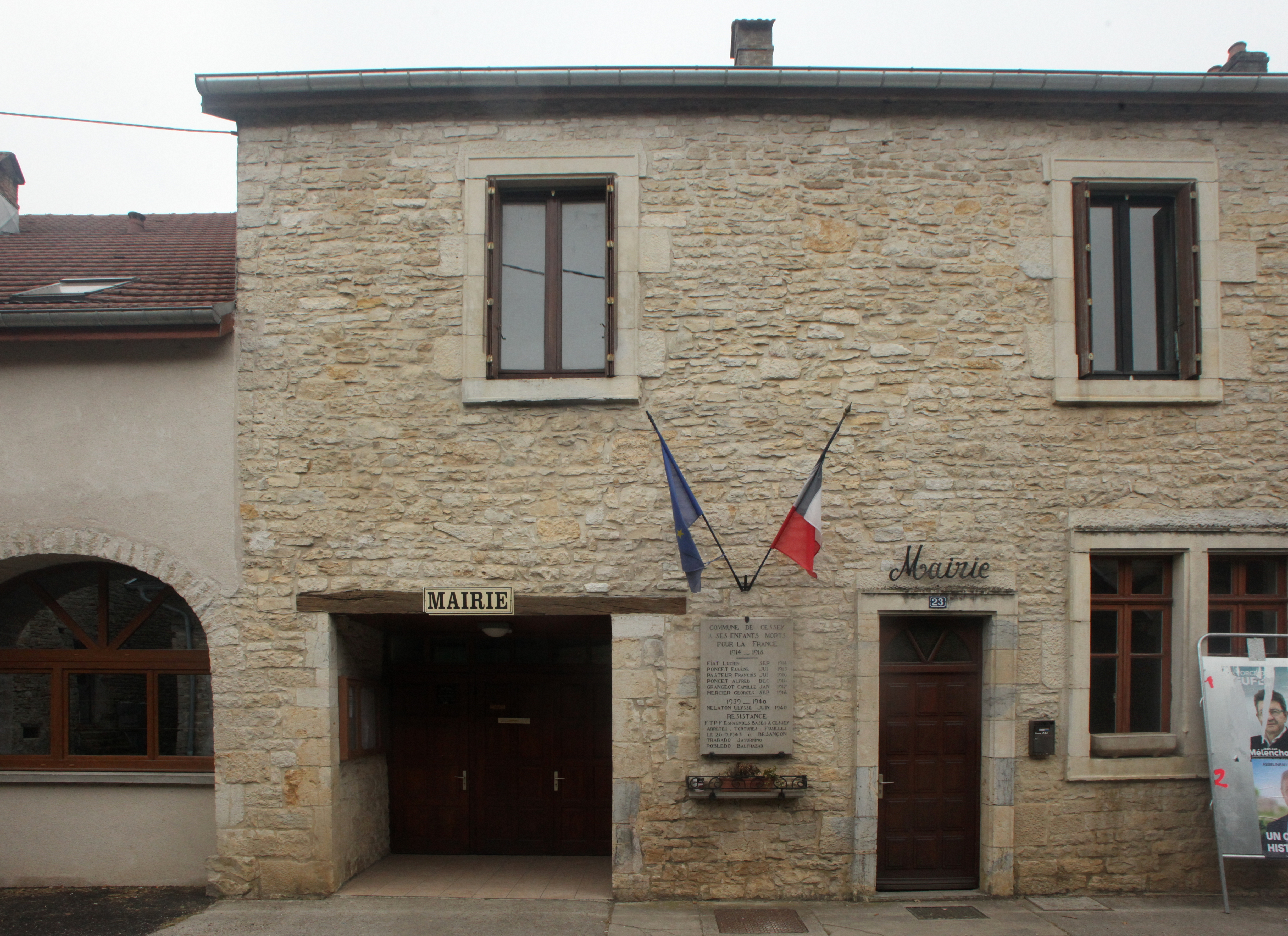 Mairie de Cessey (Doubs).